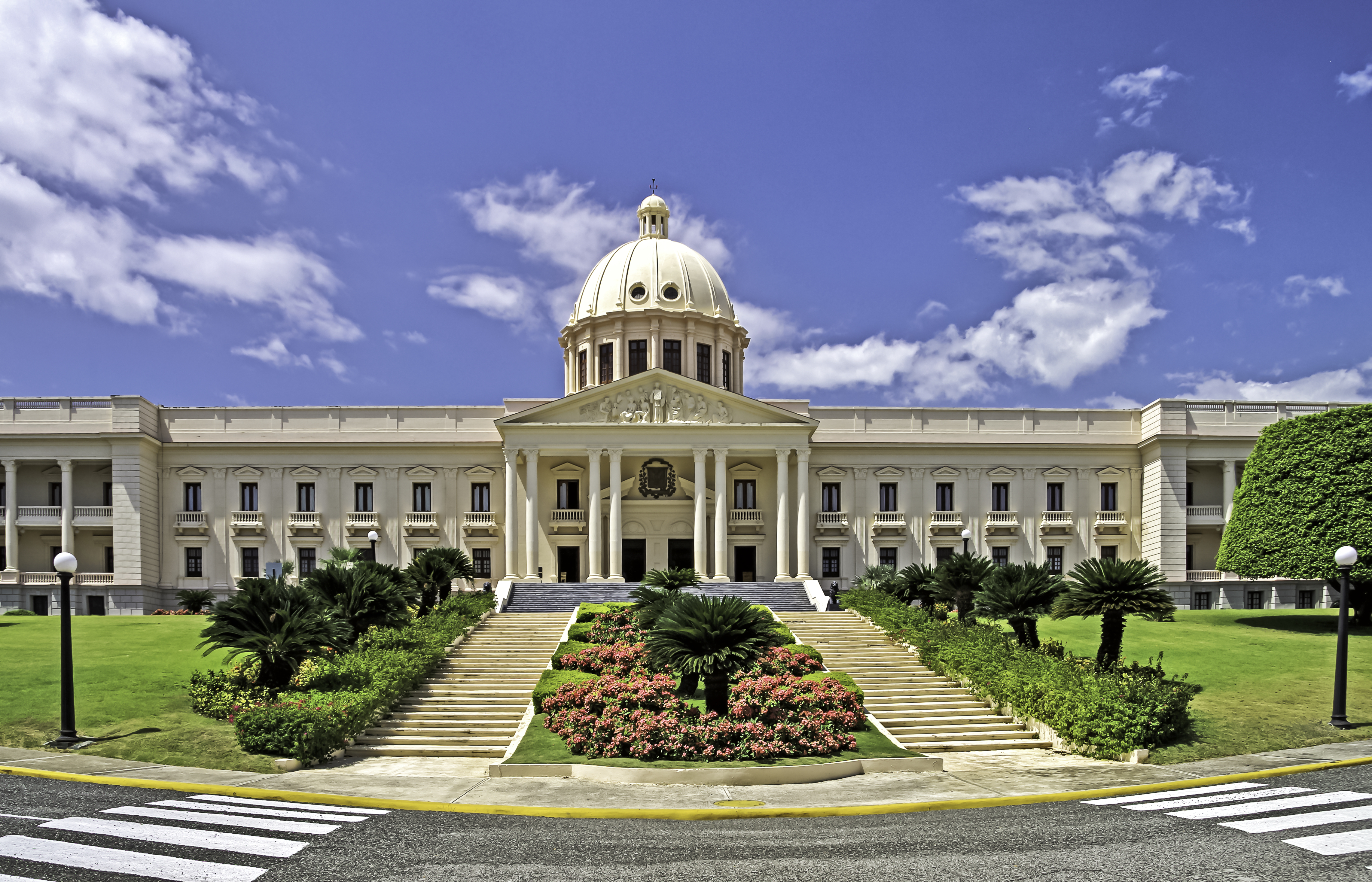 Santo Domingo National Palace